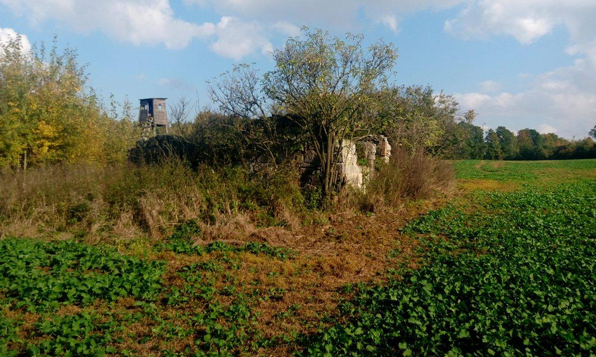 Pozostałości zabudowań w kolonii Górniki